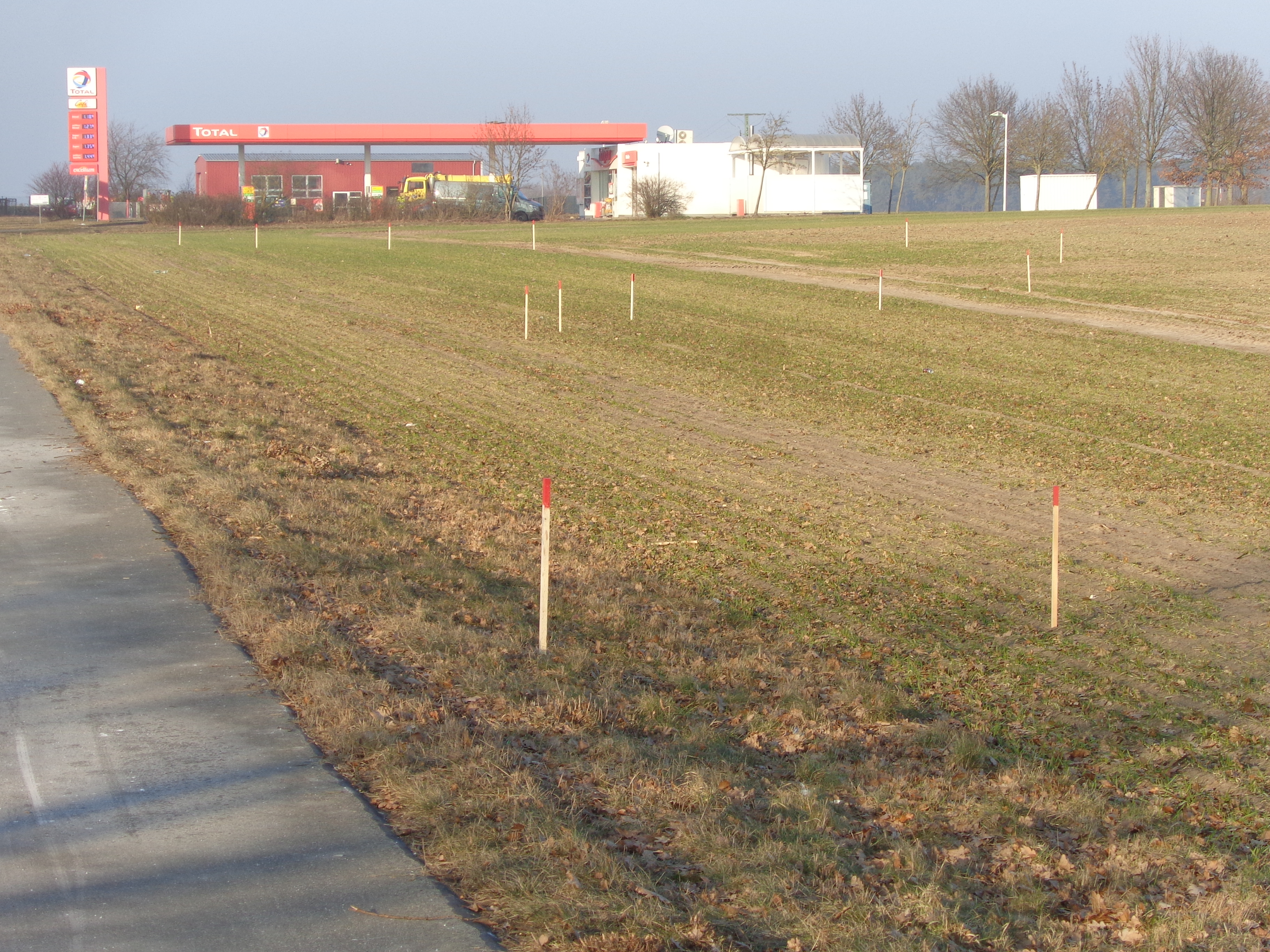 Absteckung einer Straßenbaustelle an der B 103 in Plau am See, Kreisverkehr für die Einmündung der B 191